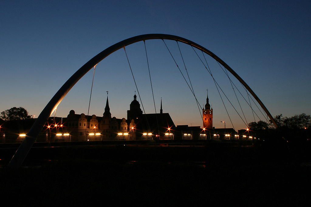 Dessau, Fussgaengerbruecke ueber die Mulde